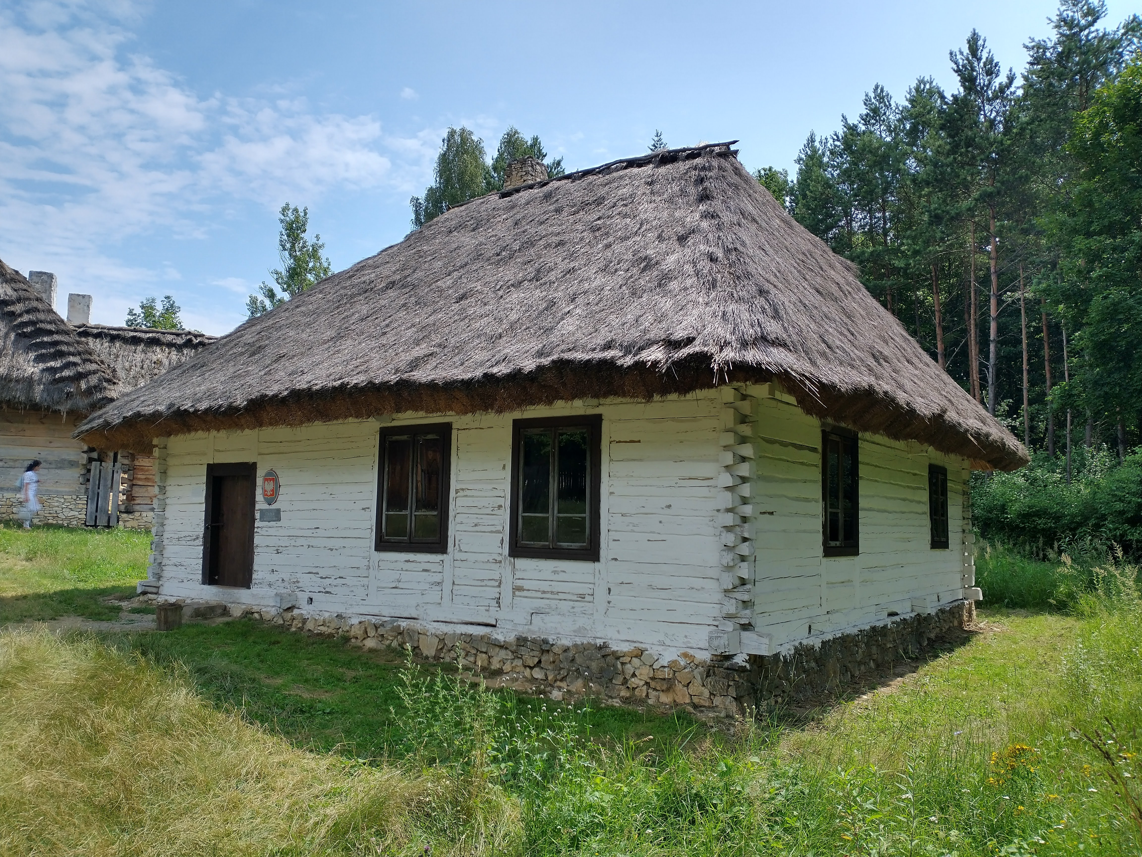 Ekspozycja skansenu w Tokarni.